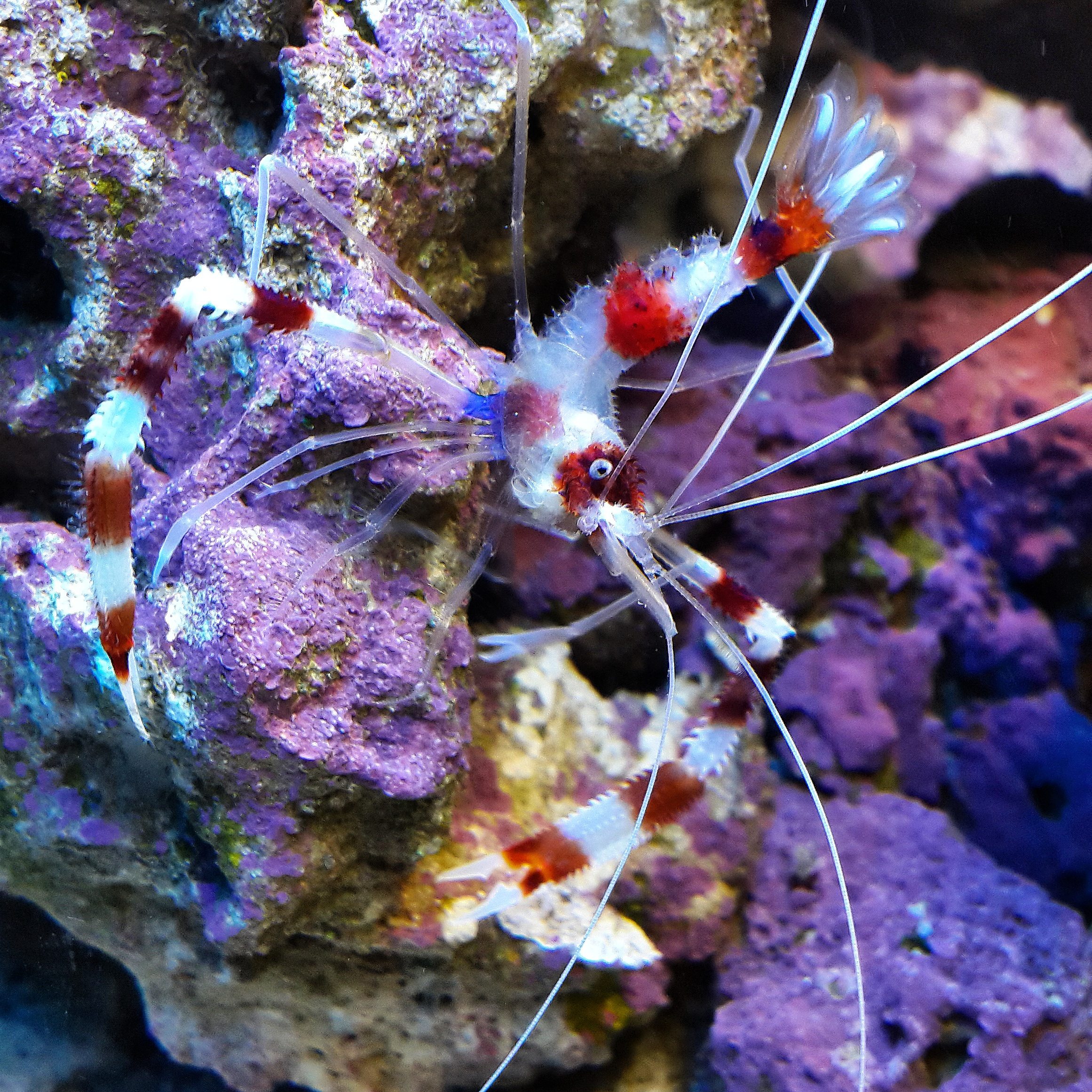 mercan karidesi